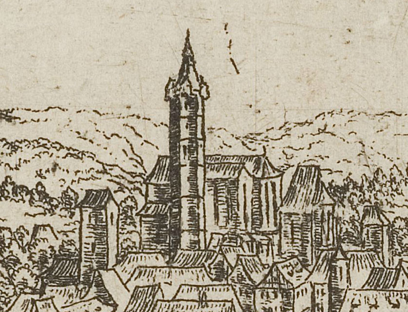 Die Steyrer Stadtpfarrkirche auf einer Radierung Hans Sebald Lautensacks